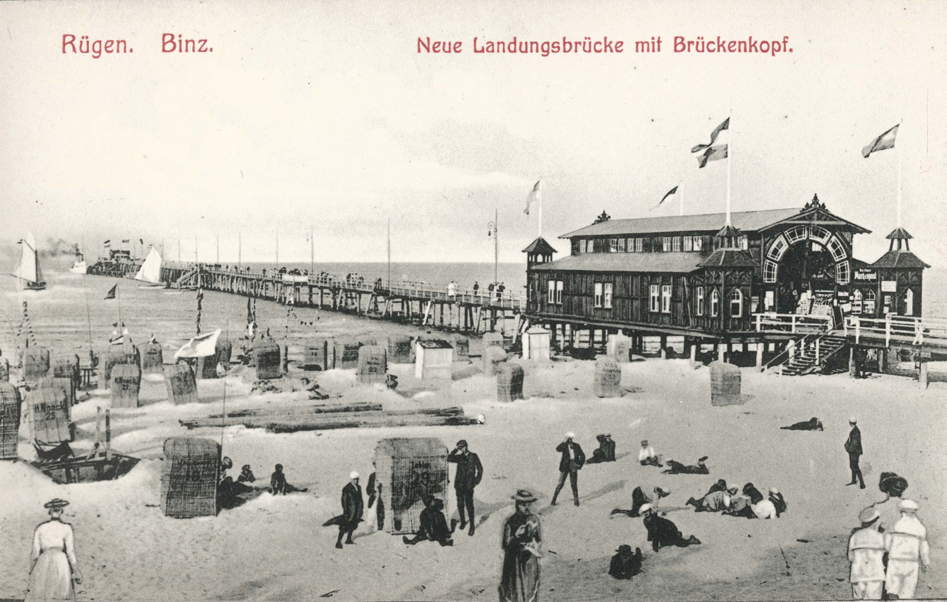 Die Binzer Prinz-Heinrich-Brücke wurde als Landungsbrücke genutzt, über die die Sommergäste ihren Urlaubsort erreichten. Im Brückenhaus erwartete sie die gewohnte Zeitungslektüre, wie beispielsweise die „Berliner Morgenpost“. Am Brückenkopf befand sich ein gefragtes Restaurant. Das Betreten des Stegs war nur gegen Zahlung eines „Brückengelds“ möglich. Postkarte um 1900.